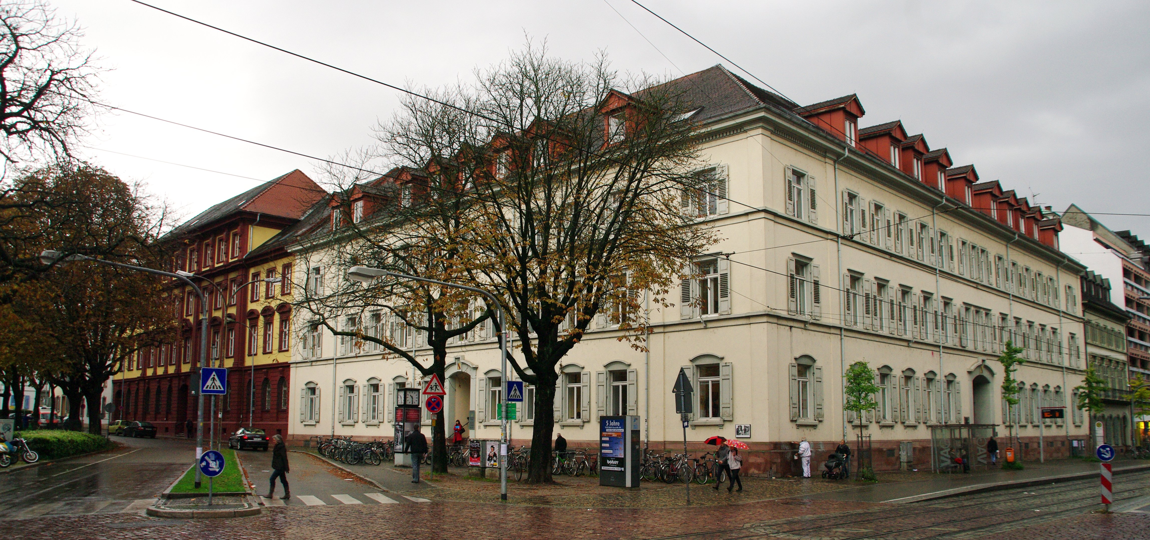 Die Gebäudefront des Amtsgerichts Holzmarkt Ecke Kaiser Joseph straße